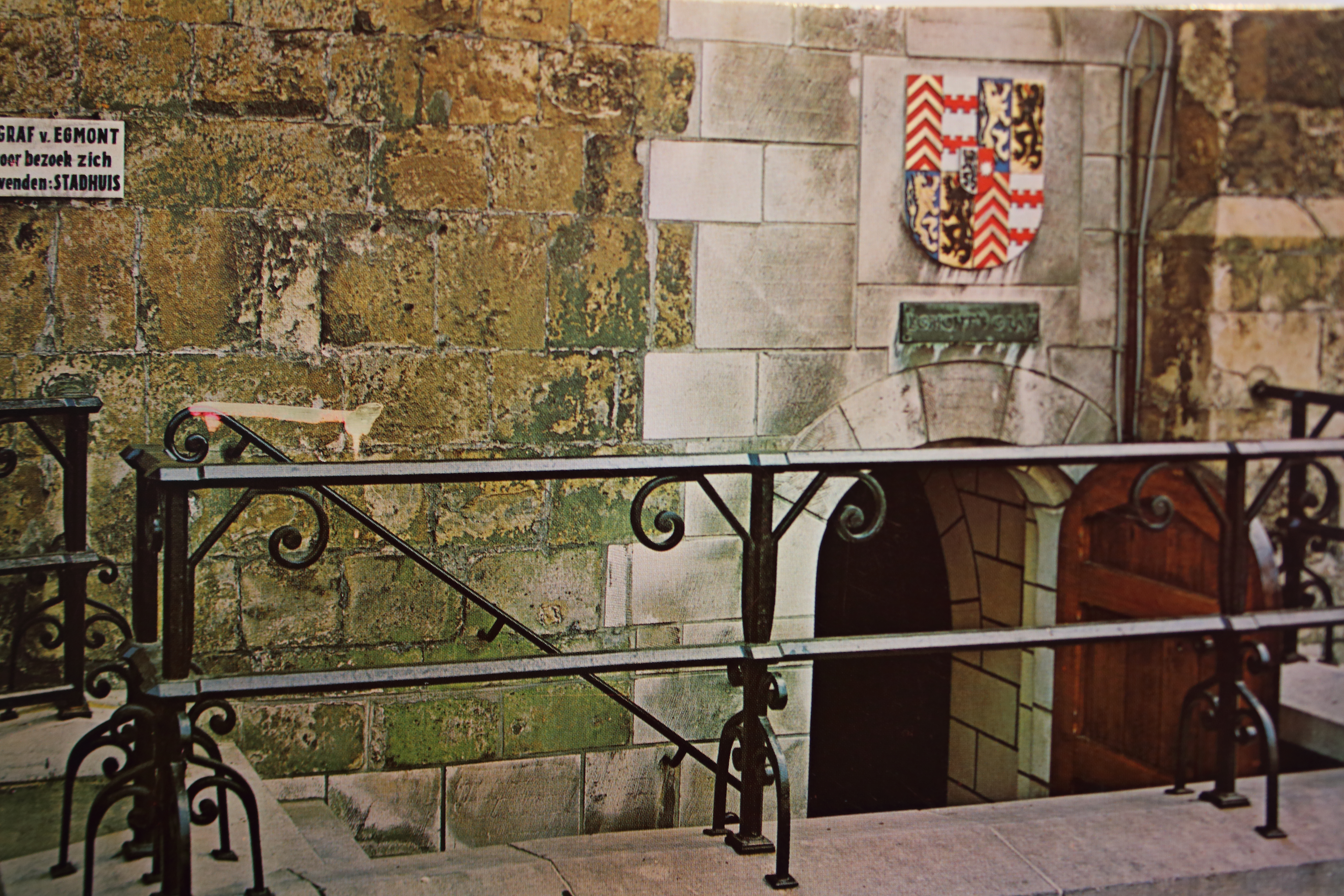 Egmontcrypte, Markt, Zottegem, Vlaanderen, België (historische prentbriefkaart)